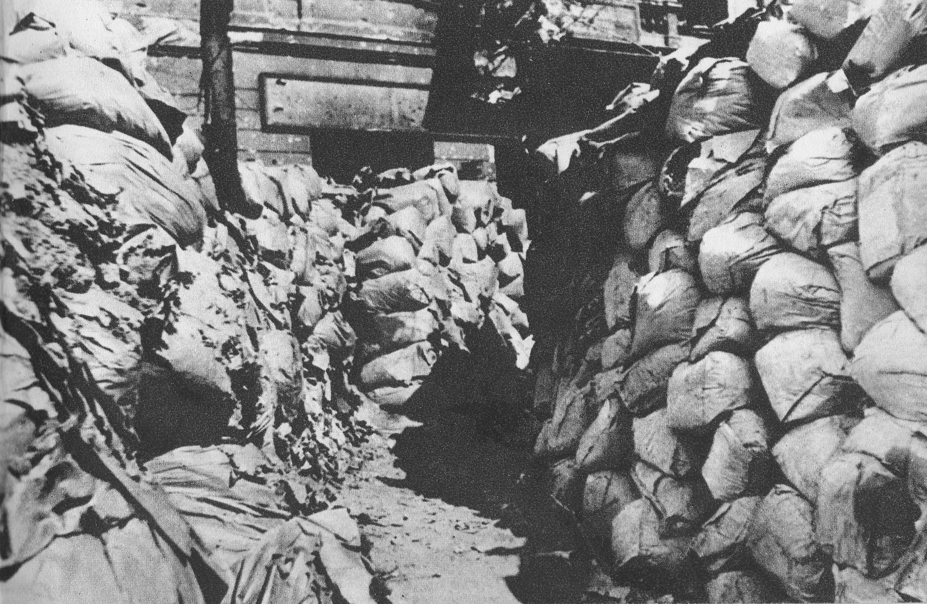 Powstanie warszawskie Barykada przez Aleje Jerozolimskie